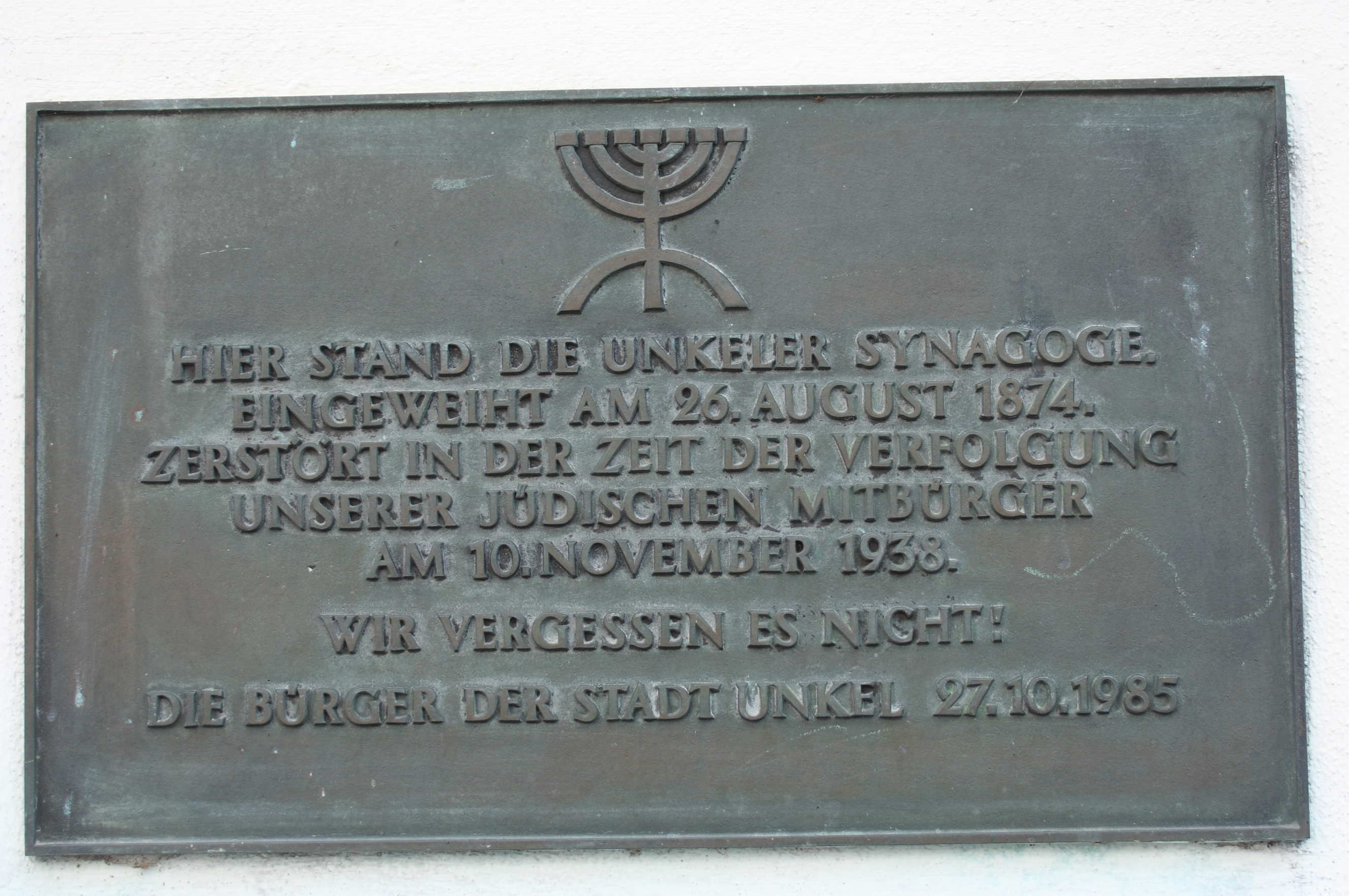 Gedenktafel zur Erinnerung an die zerstörte Synagoge in Unkel, Ecke Freiligrathstraße/Am Graben